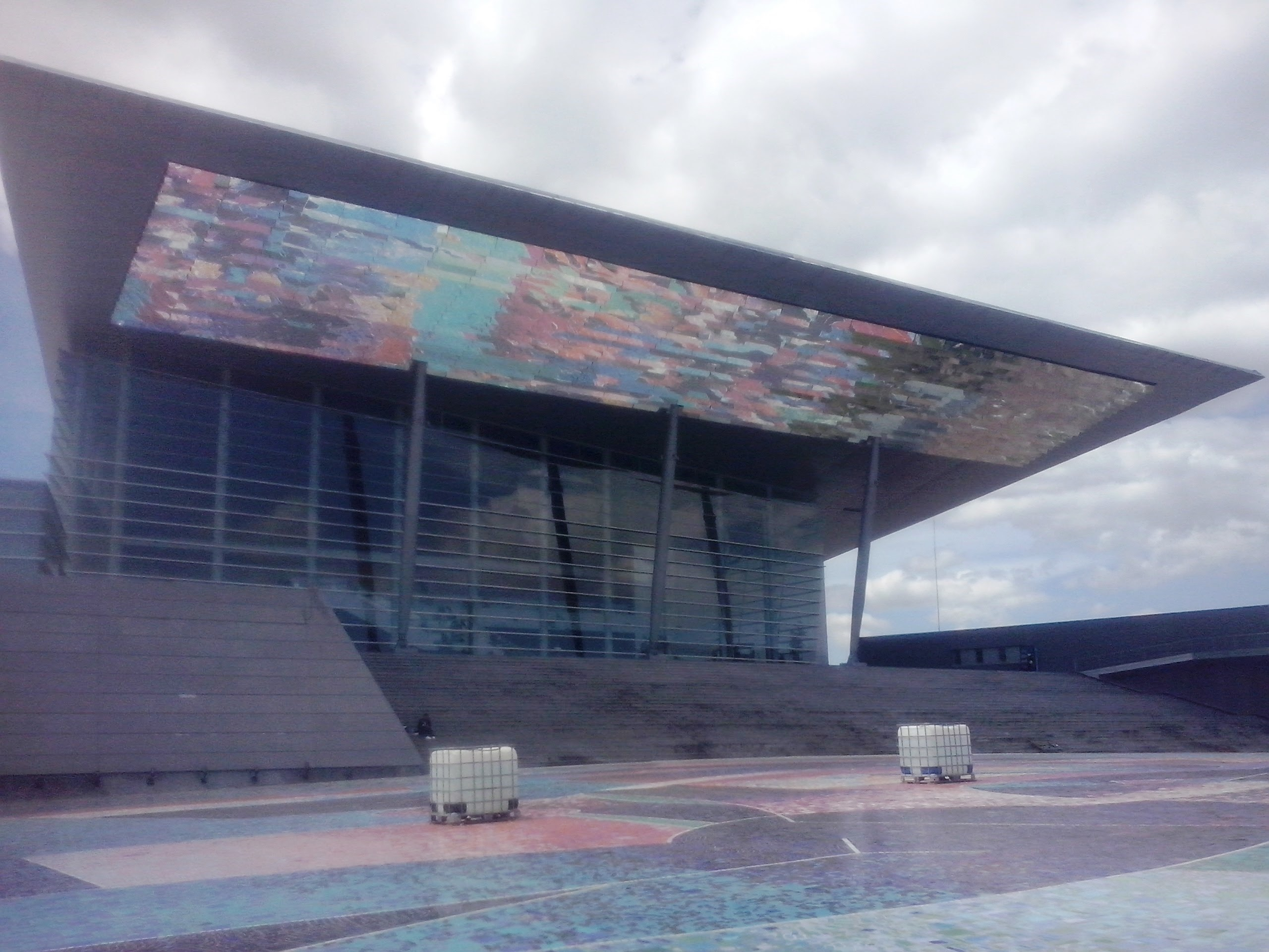 Teatro Auditorio Gota de Plata en el Parque David Ben Gurión en la ciudad de Pachuca de Soto, México.